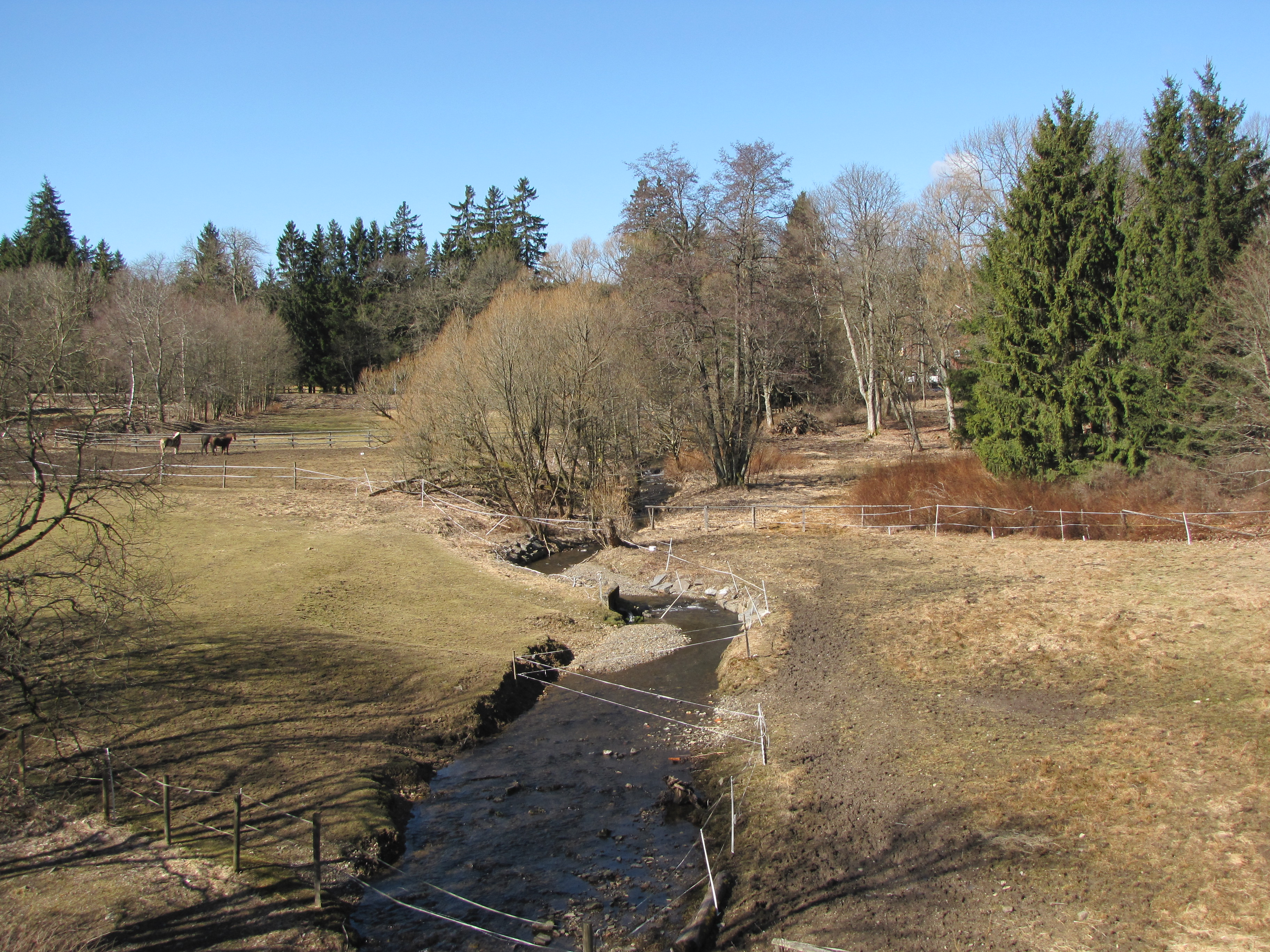 Der Brunnenbach kurz vor der Unterquerung der B 27, z.T. im NSG Bachtäler im Oberharz um Braunlage